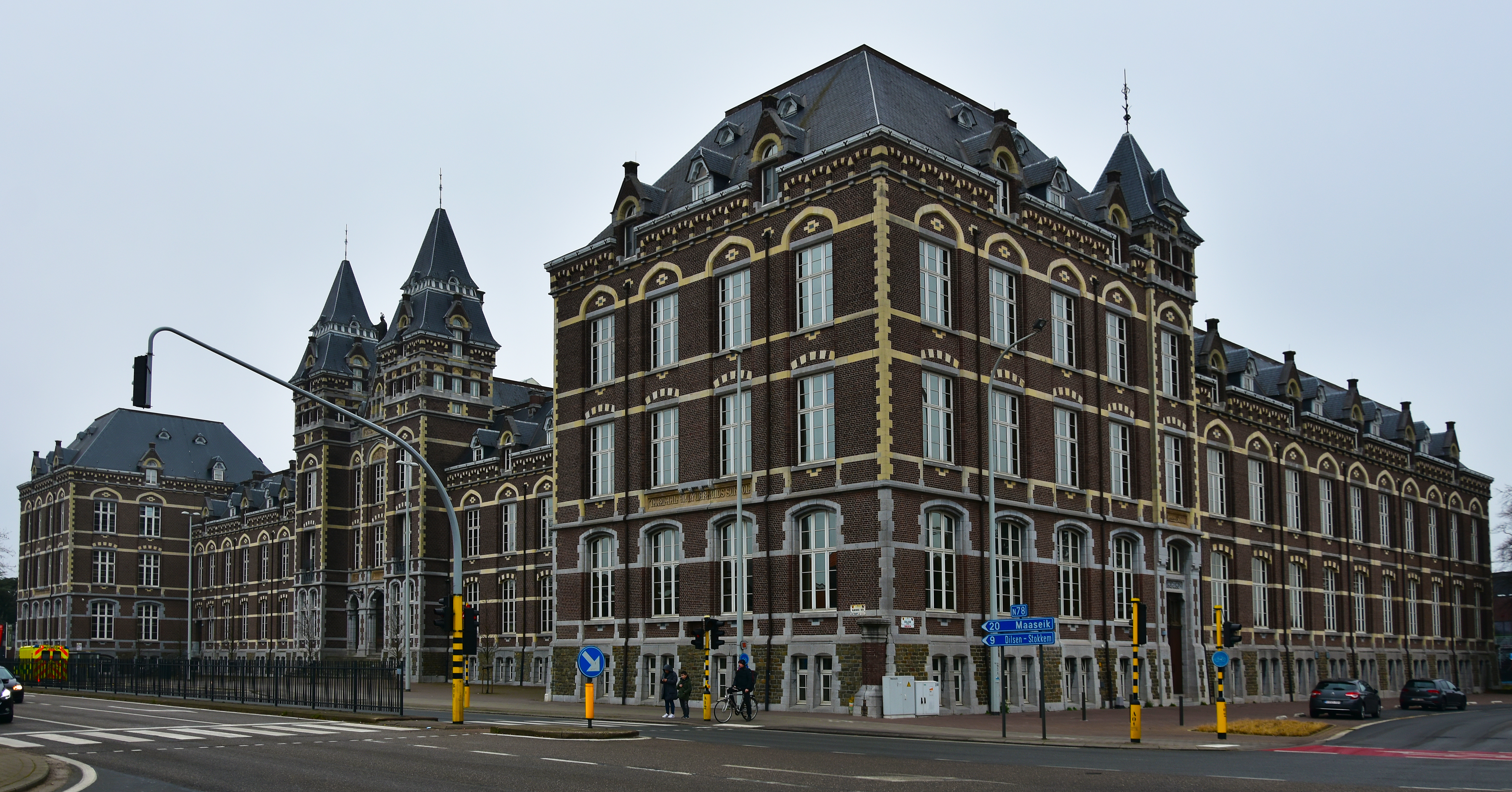 Maasmechelen college (1119) 25-01-2020 15-49-57